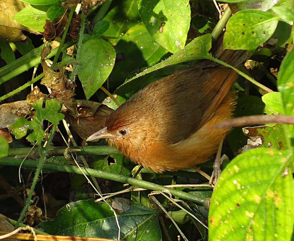 At Tikarpara, Satkosia Tiger Reserve, Odisha, India on 26-12-2012 Birds, fauna, wildlife at Tikarpara, Satkosia Tiger Reserve, Odisha, India